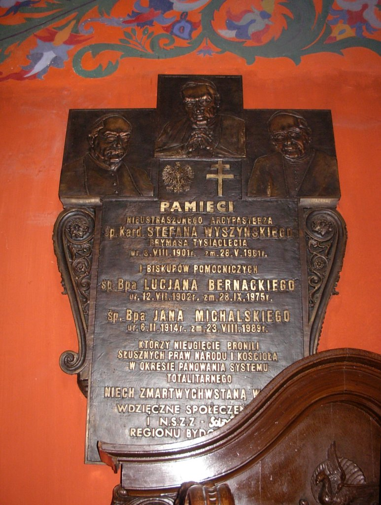 Epitafium z mosiądzu projektu art. rzeźbiarza Aleksandra Dętkosia z Bydgoszczy (1992 r.) poświęcone pamięci Prymasa Tysiąclecia kard. Stefana Wyszyńskiego (1901-81) oraz biskupów pomocniczych archidiecezji gnieźnieńskiej: Lucjana Bernackiego (1902-75) i Jana Michalskiego (1914-89). Znajduje się na ścianie południowej, obok ołtarza św. Antoniego.